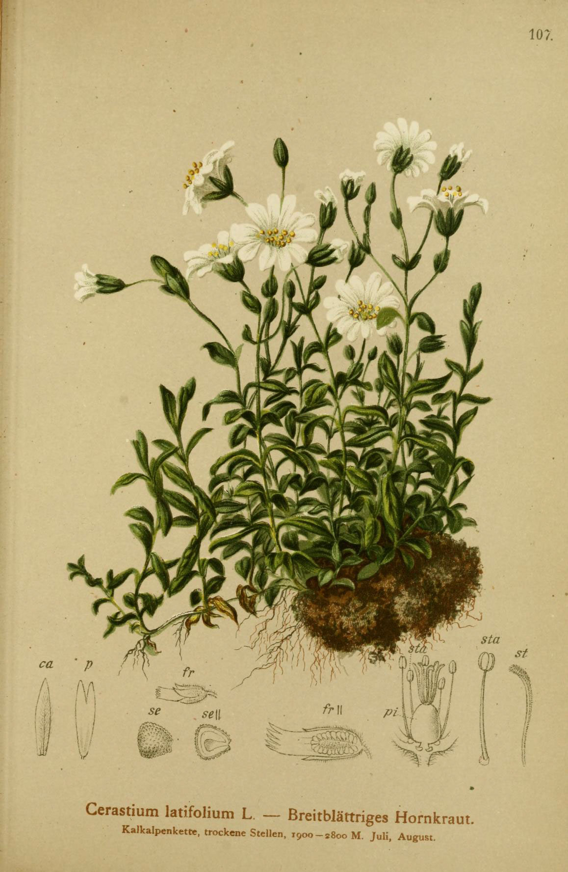 iül st fr'- trä f "'^^^mk Cerastium latifolium L. — ßreitblättriges Hornkraut. KaJkalpenkettc, trockene Stellen, 1900-2800 M. Juli, August.